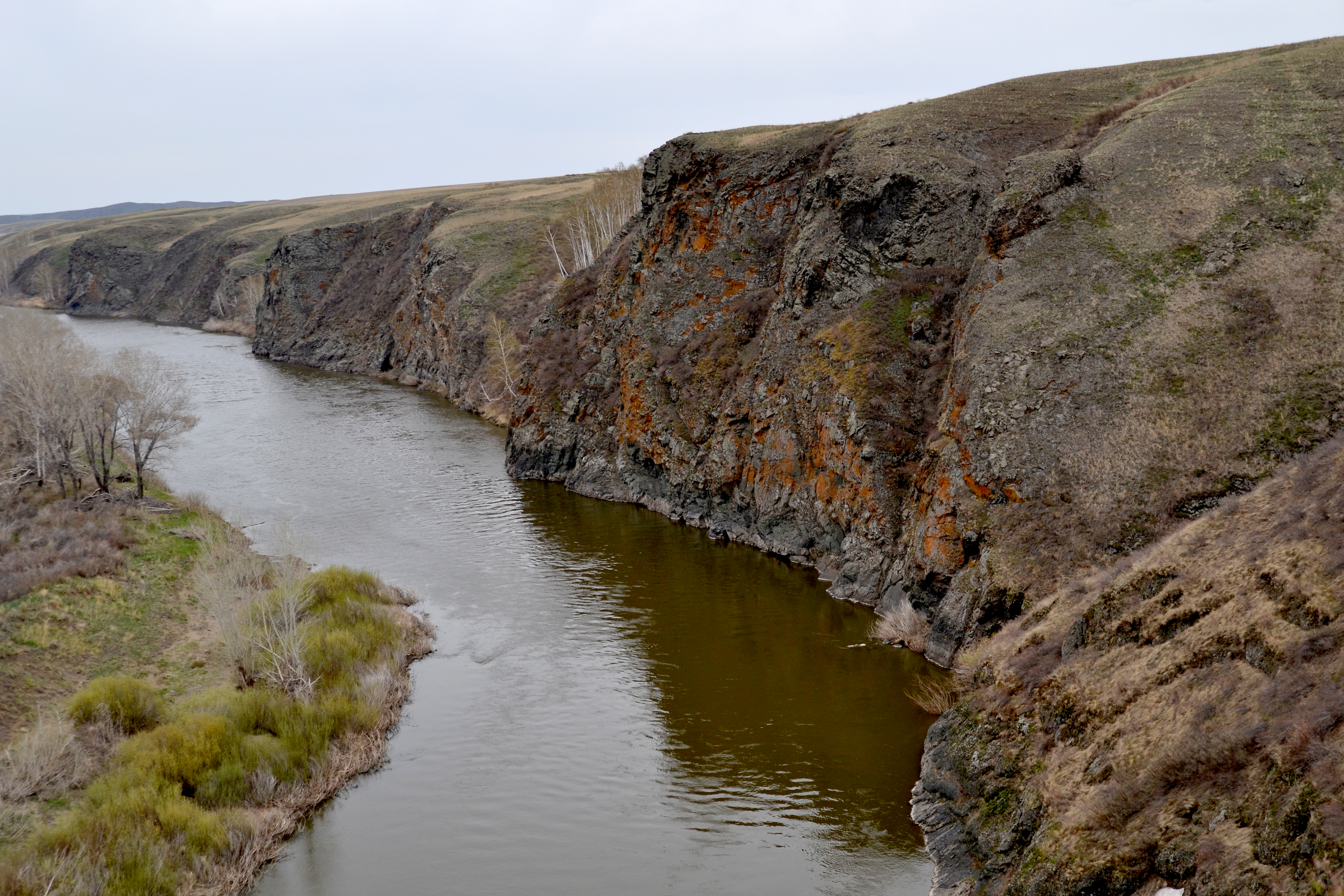 Утесы «Семь Братьев», Кизильский район This image is related to the protected area of Russia number 7410158